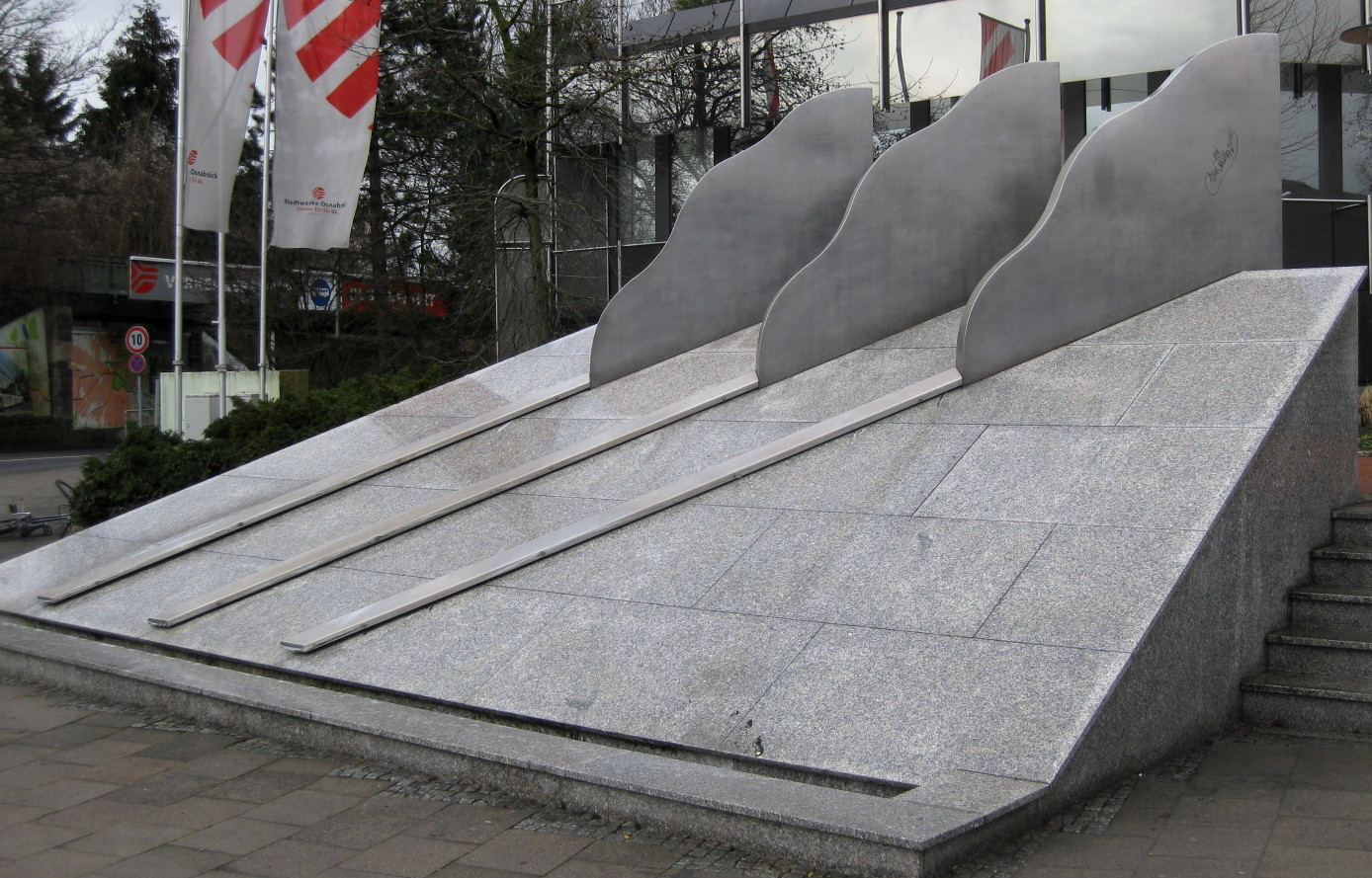 Stefan Schwerdtfeger (* 1928): Wolkenbrunnen (1978-1980), Edelstahl, Granit, Beton, in Osnabrück (Niedersachsen) vor der Hauptverwaltung der Stadtwerke Osnabrück, Buersche Straße